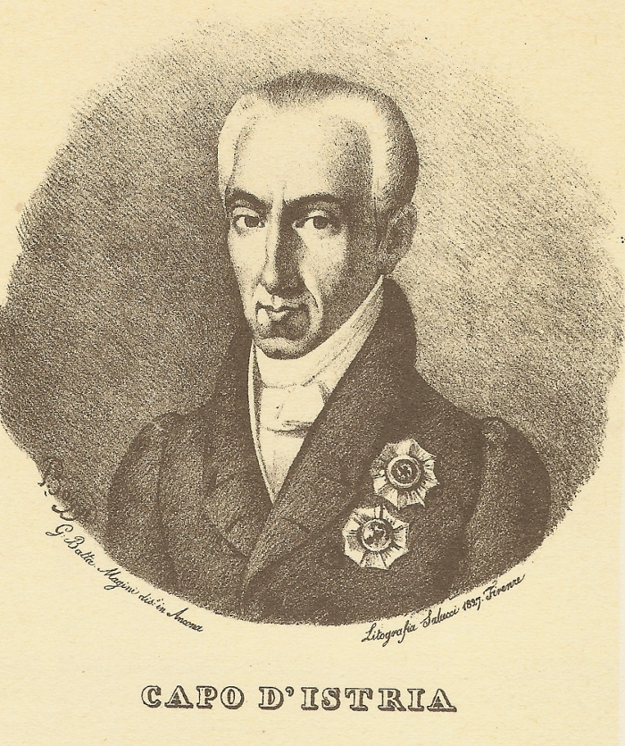 Ιωάννης Καποδίστριας